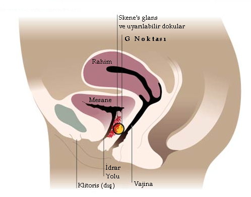 by redspy